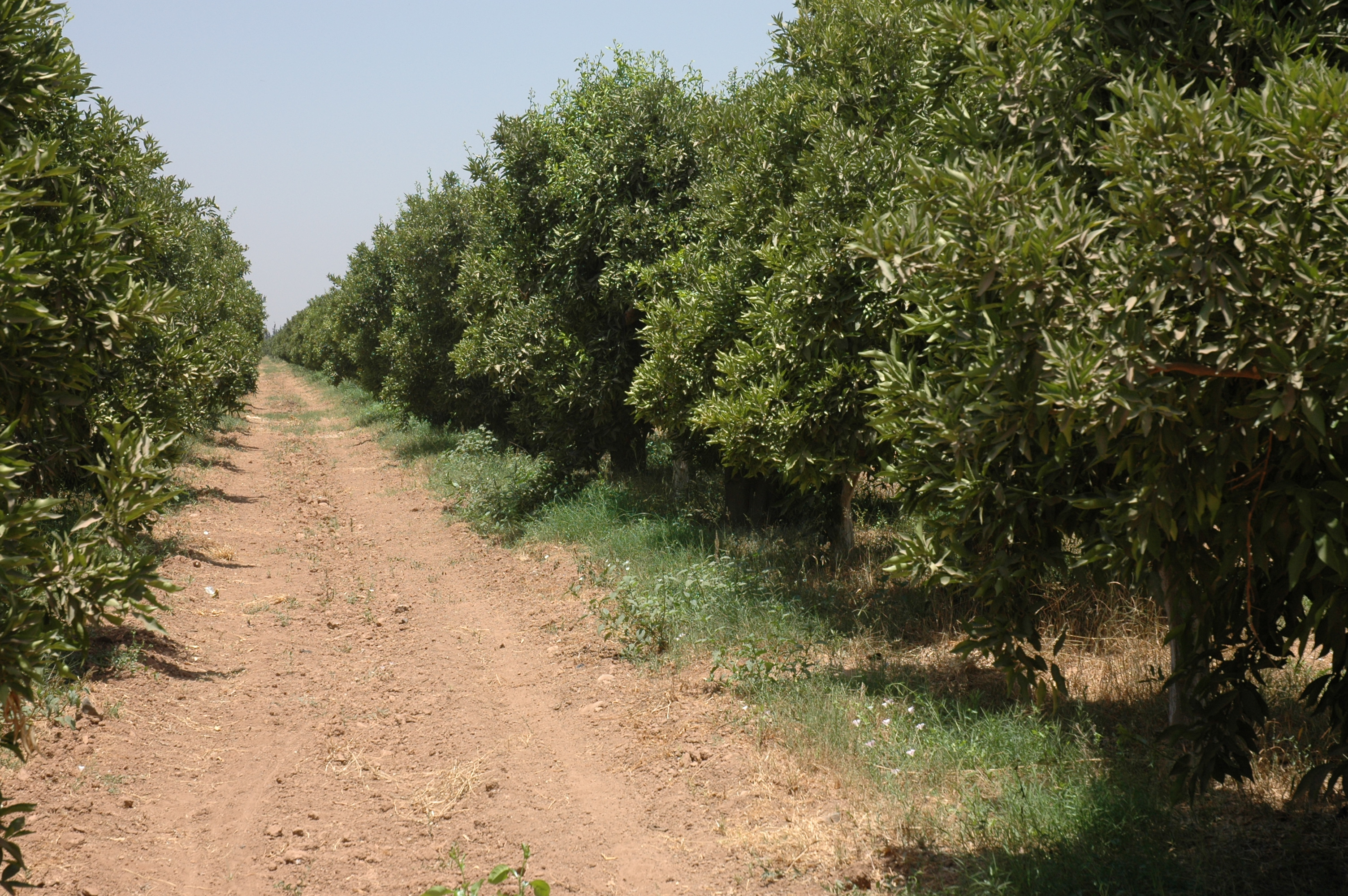 Verger d'orangers dans un domaine du Souss